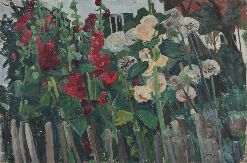 Daisy Campi, Malven, Öl auf Leinwand, um 1931, 66x100 cm